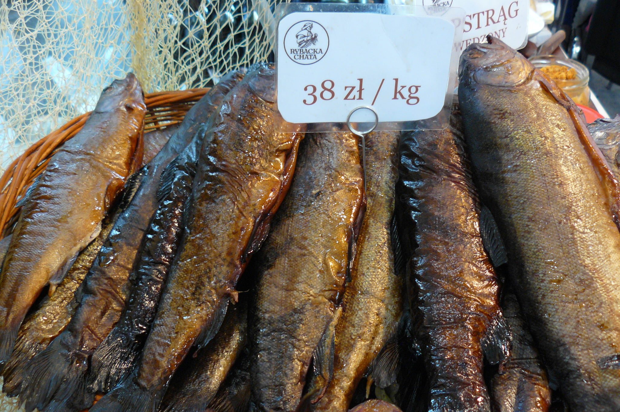 Targi Smaki Regionów w Poznaniu - 2015r.